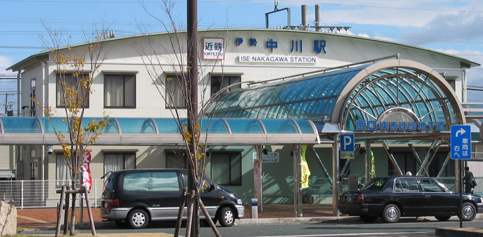 三重県松阪市にある近鉄伊勢中川駅の西口。2006/11/12 投稿者撮影